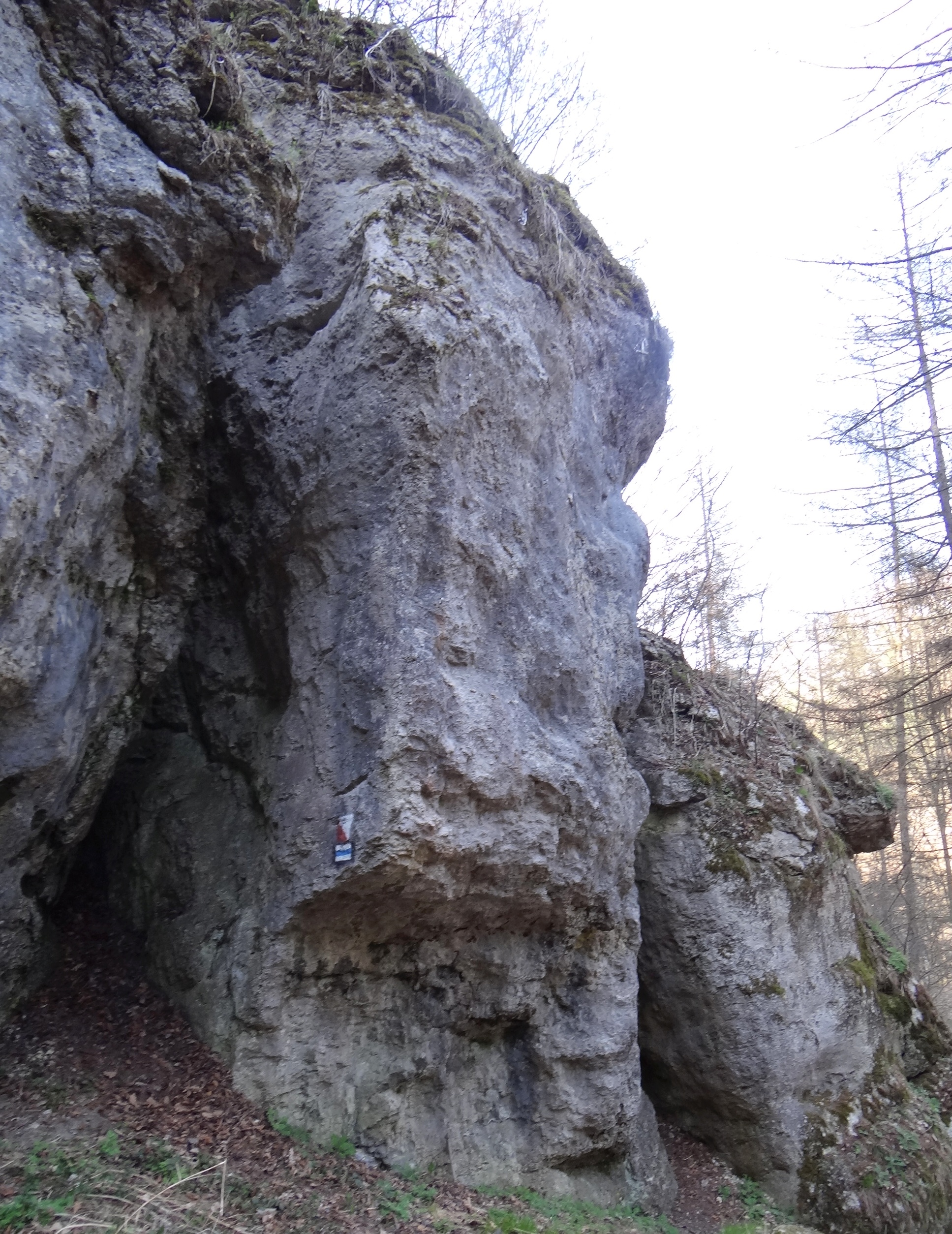 Brzuszna Skała w Dolinie Brzoskwinki